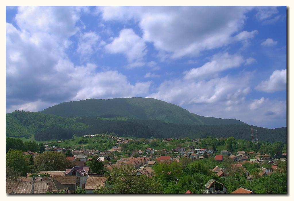 experiment hdr, din balcon